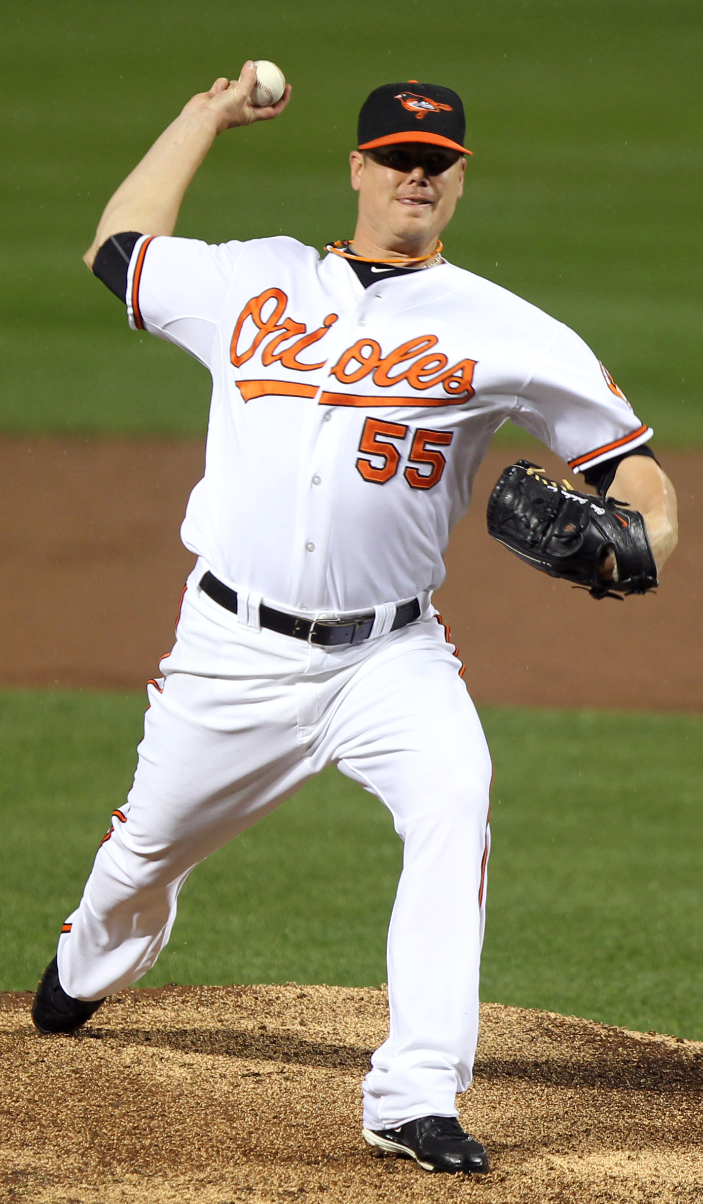 Chris Jakubauskas